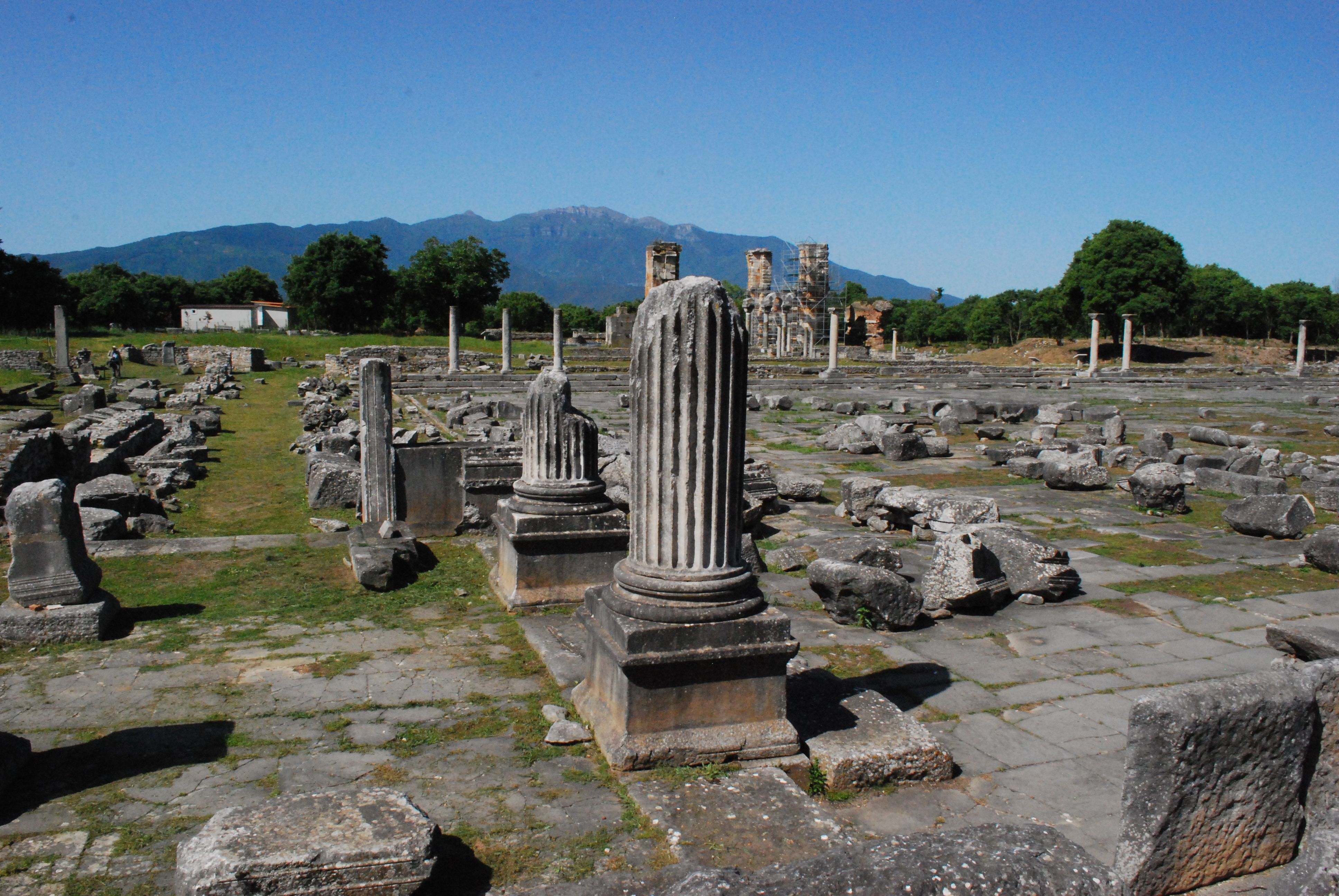 Vue du site archéologique de l'ancienne ville de Philippes, près de Kavala, en Macédoine (Grèce).